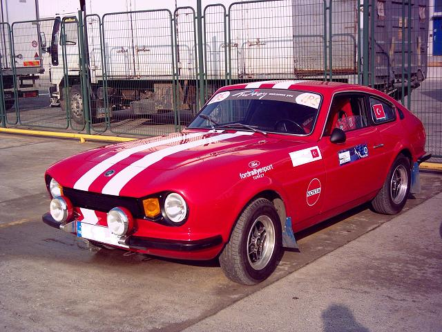 Türkiye'de seri olarak üretilen ilk otomobil markası Anadol'dan bir görünüm.